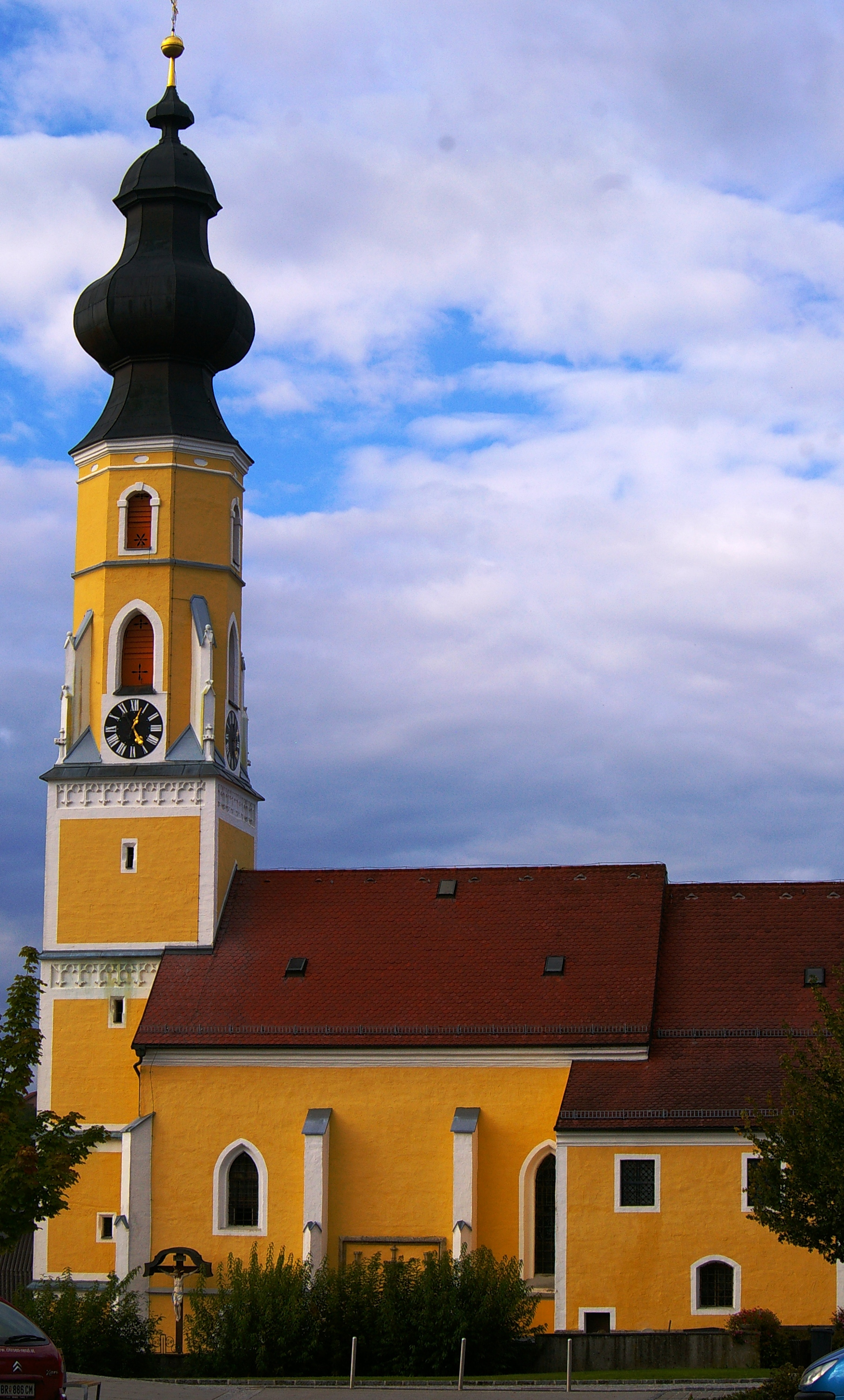 Pfarrkirche der Pfarre Tarsdorf